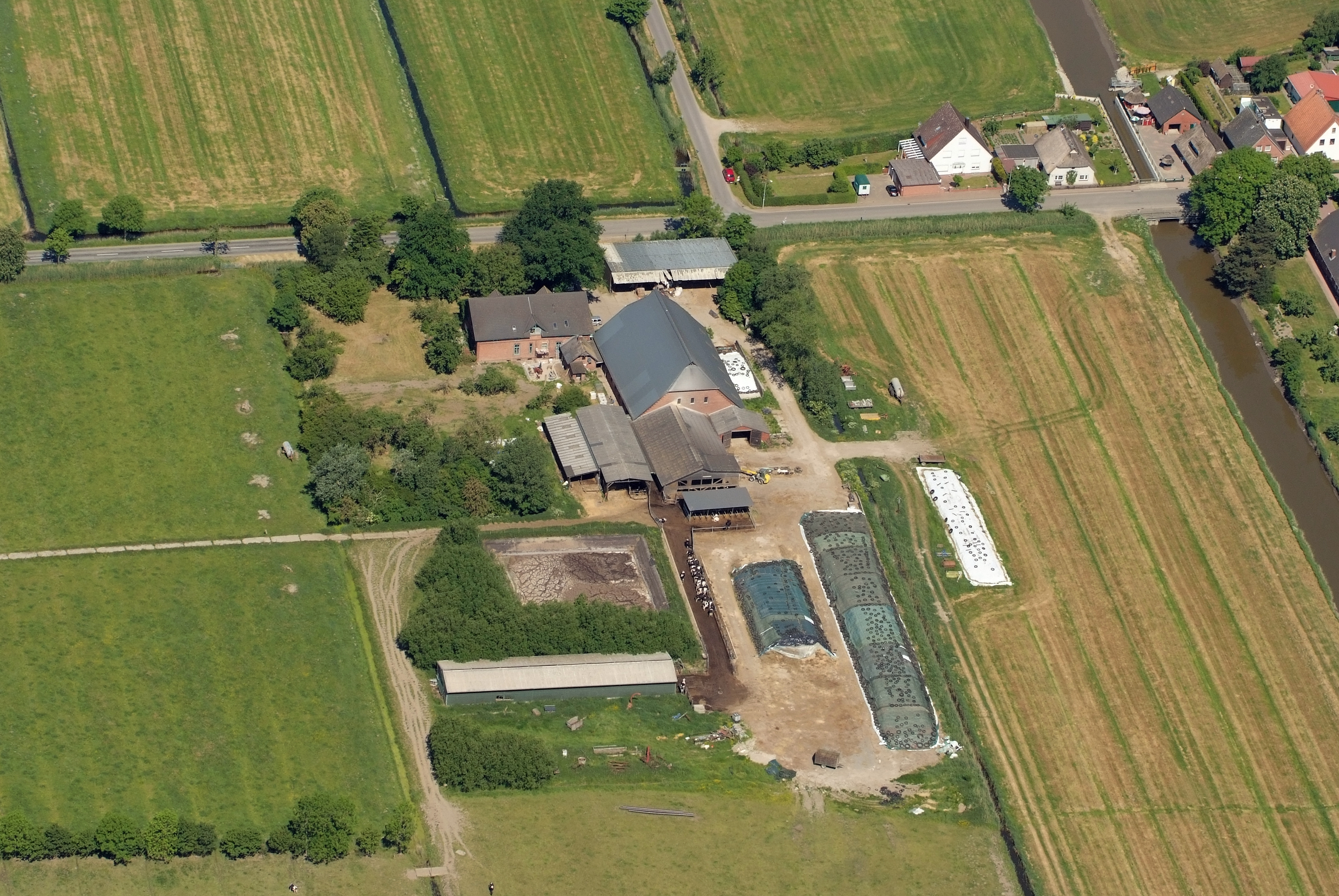 Bauernhof in Overwarfe (Loxstedt) Fotoflug vom Flugplatz Nordholz-Spieka über Cuxhaven und Wilhelmshaven